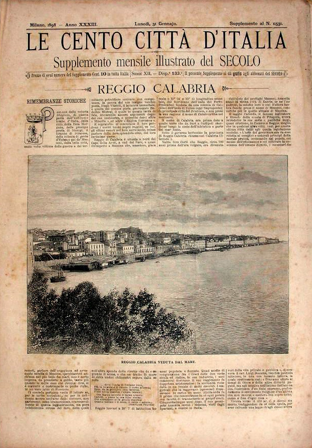 Reggio Calabria sulla rivista d'epoca "città d'italia" del 1898